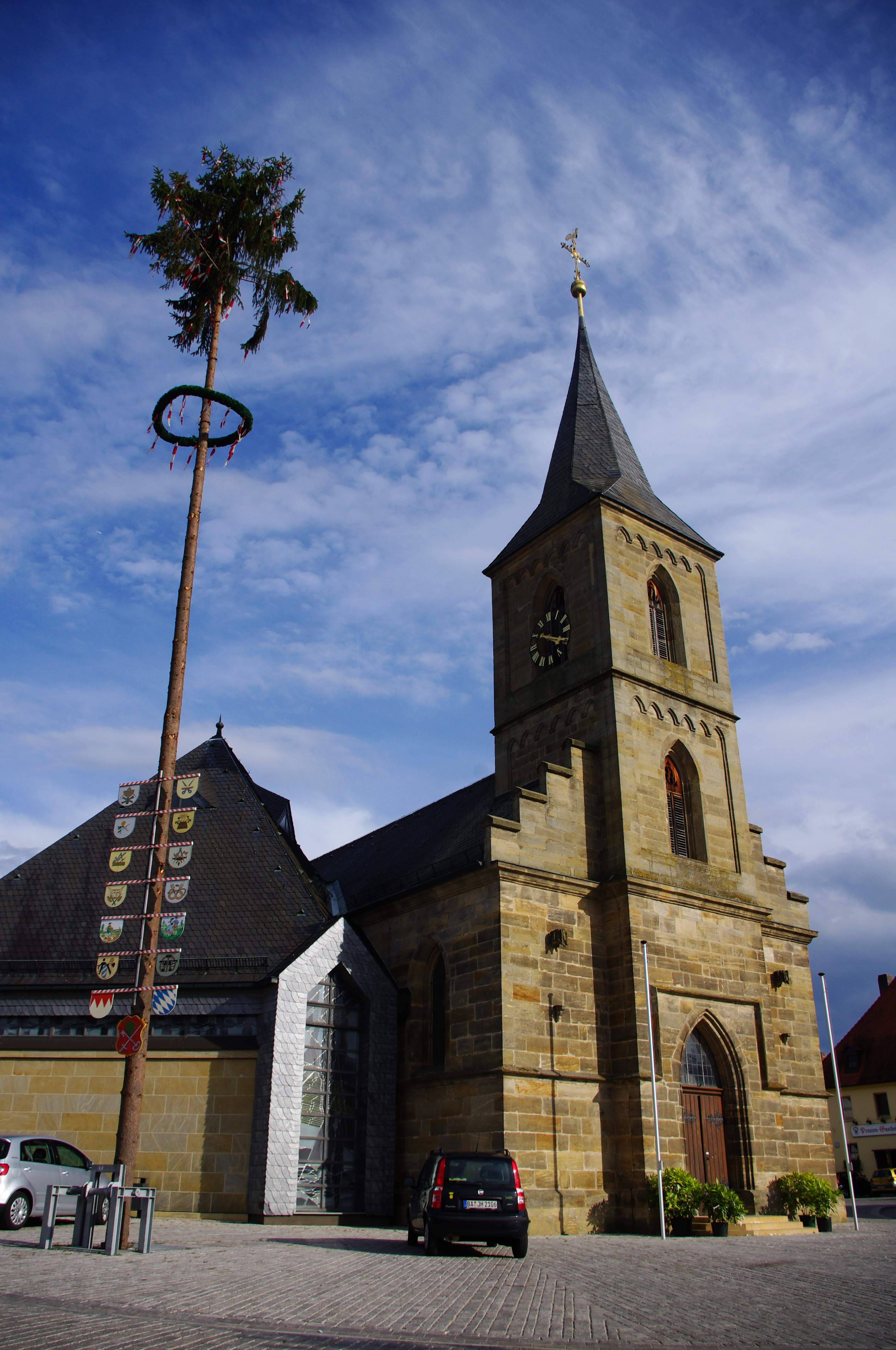 Kirche in der Mainstraße 1 in Kemmern mit MaibaumThis is a photograph of an architectural monument.